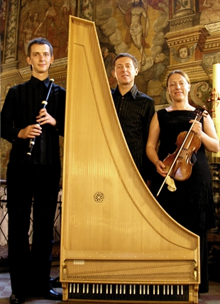 Estravaganza - Baroque Music Ensemble.